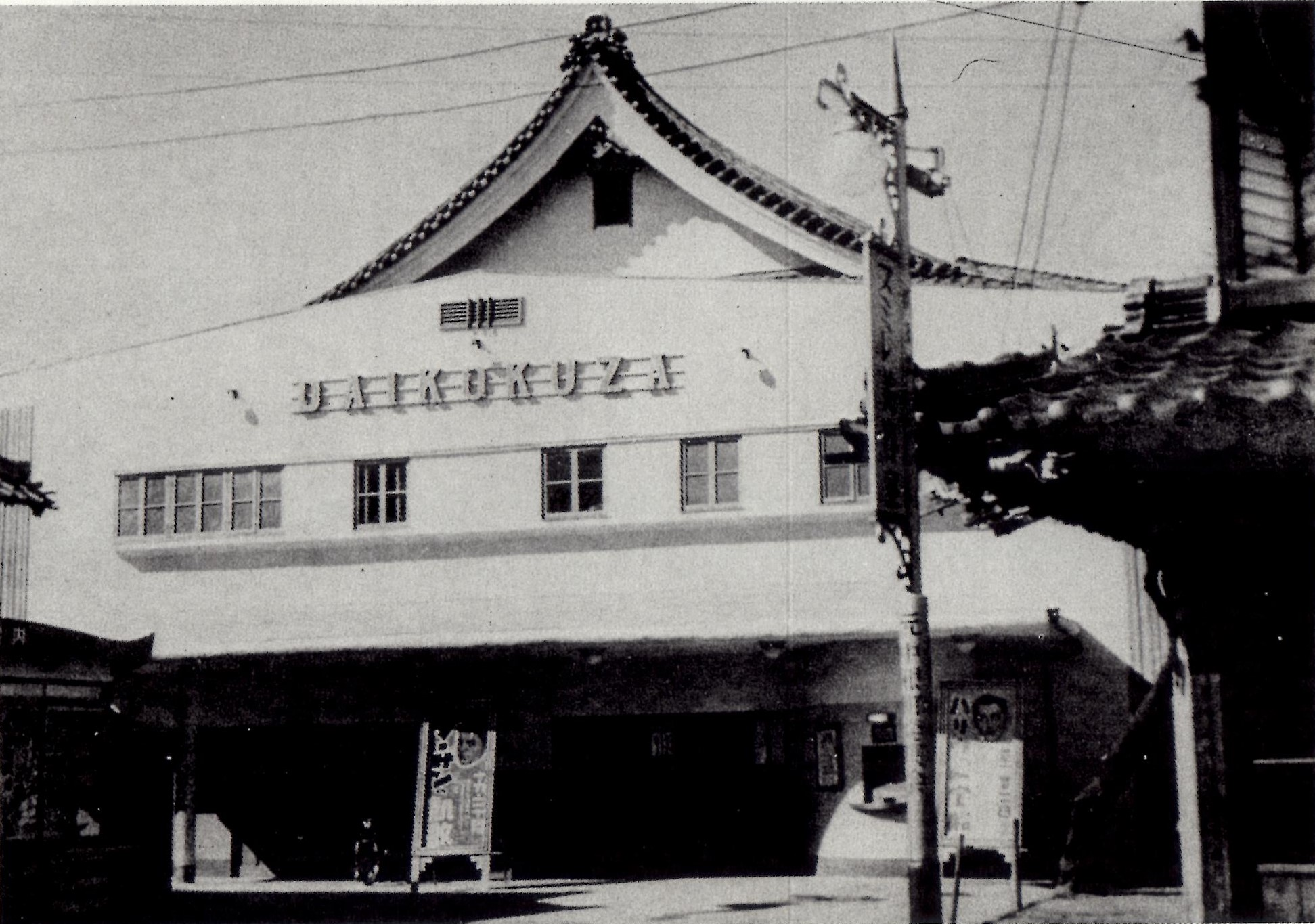 映画館「大黒座」。愛知県刈谷市。